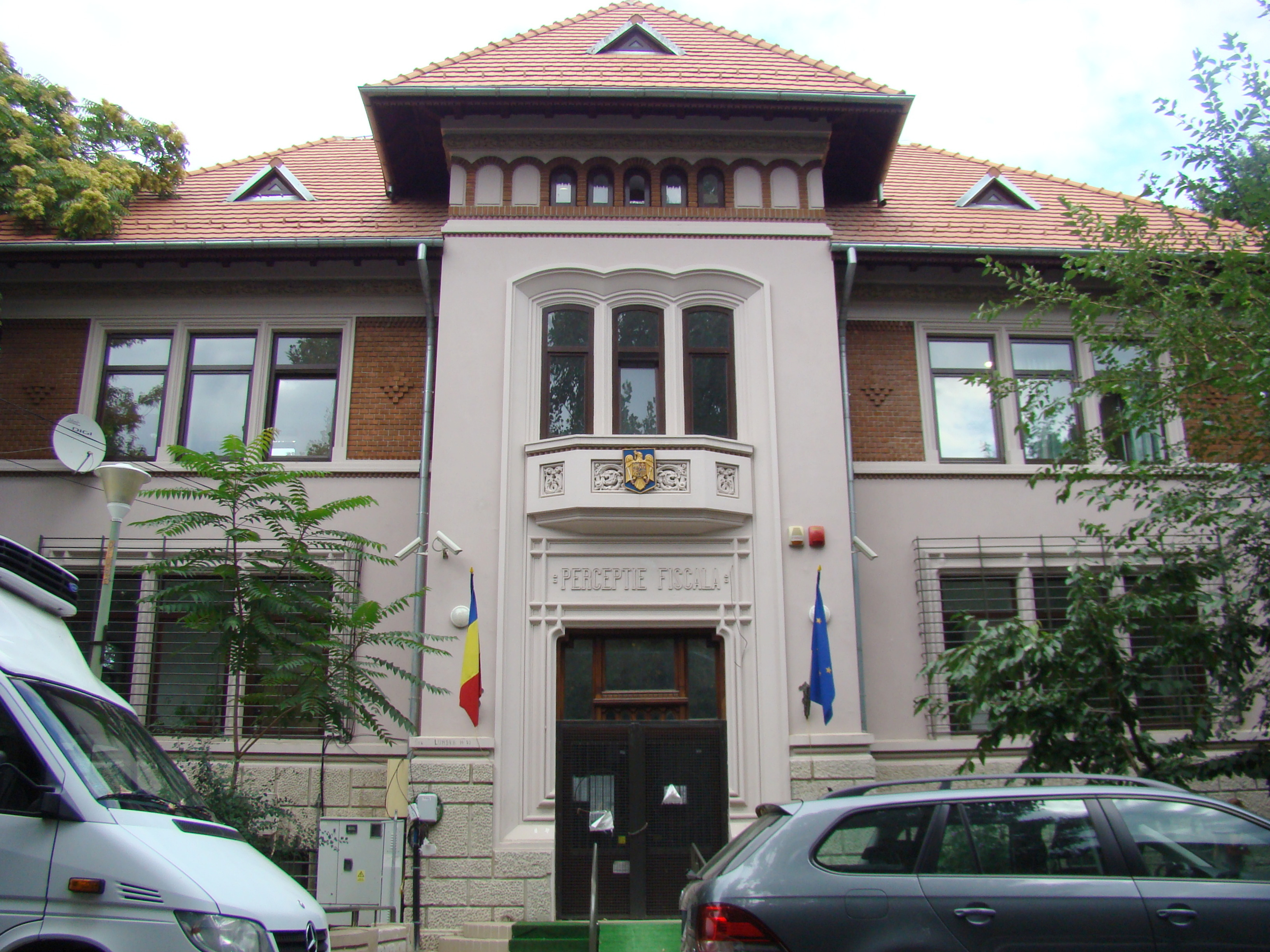 Casă monument istoric, str.Londra, nr. 10